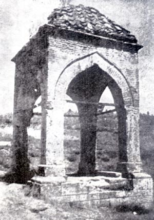 Турбе Крал К'зи